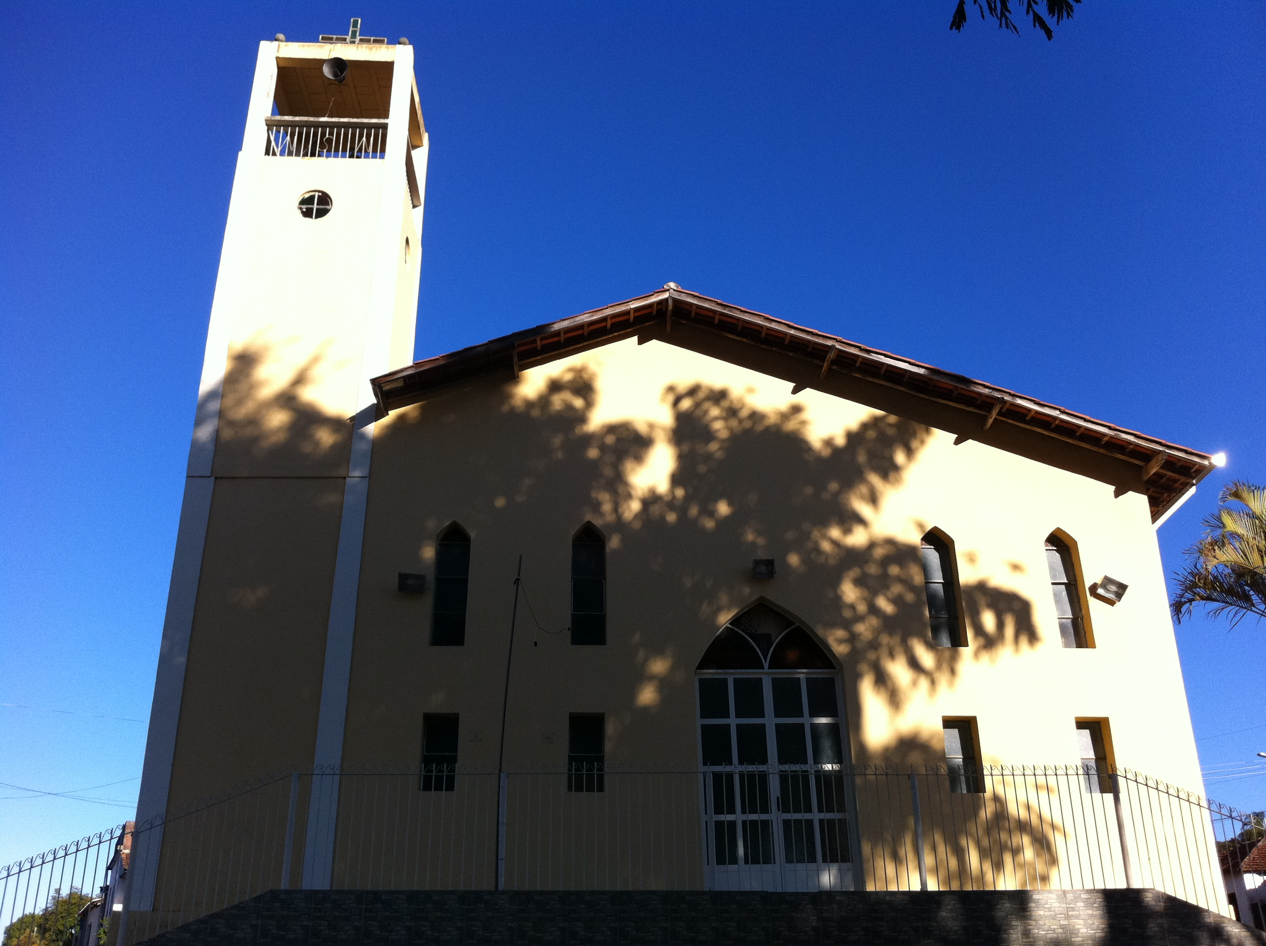 Igreja de Nossa Senhora de Nazaré. em Nazaré de Minas